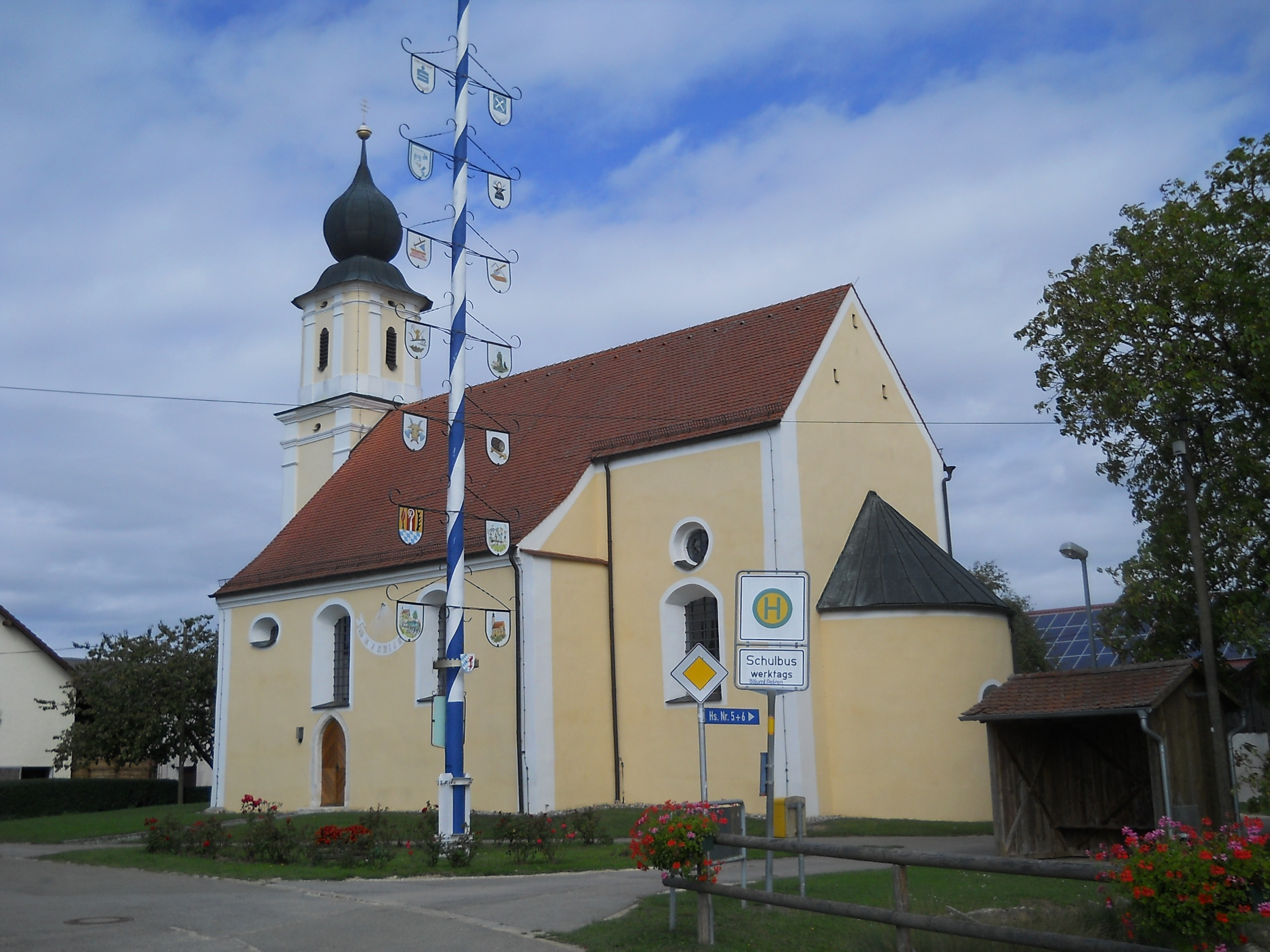 Katholische Wallfahrtskirche Unsere Liebe Frau in Neuses, einem Ortsteil des Marktes Altmannstein im oberbayerischen Landkreis EichstättThis is a photograph of an architectural monument.